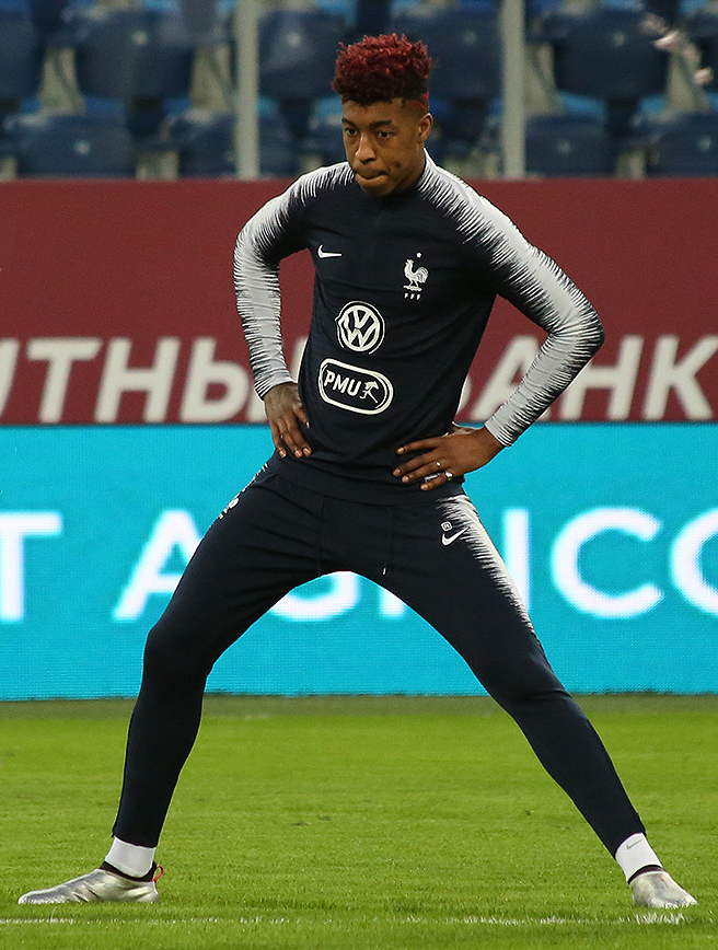 Звёзды сборной Франции готовятся к матчу с Россией